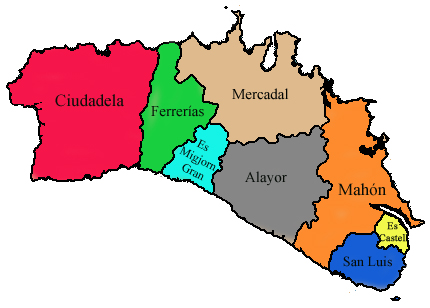 Mapa de los municipios de Menorca